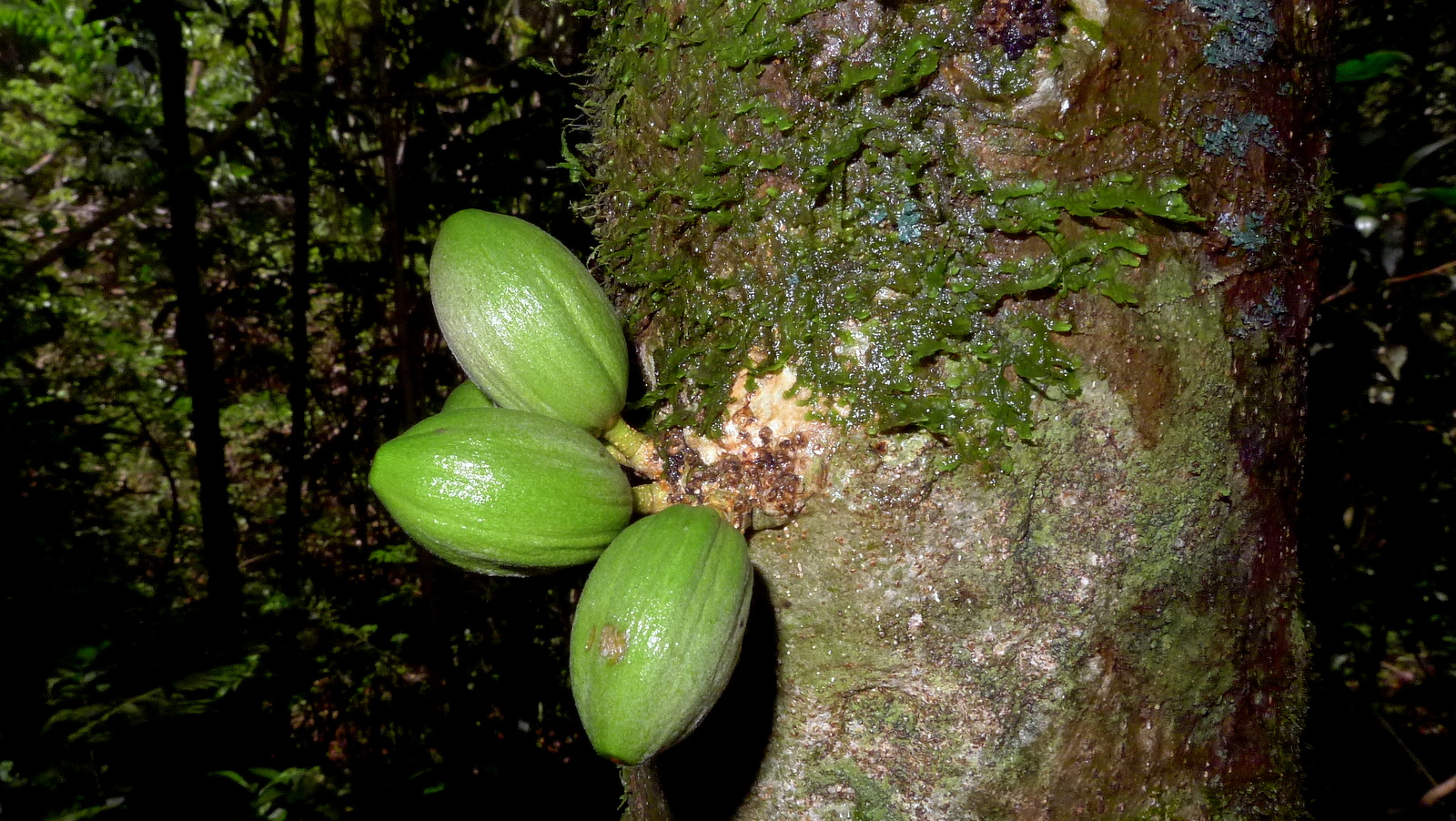 Pradosia lactescens (Vell.) Radlk.